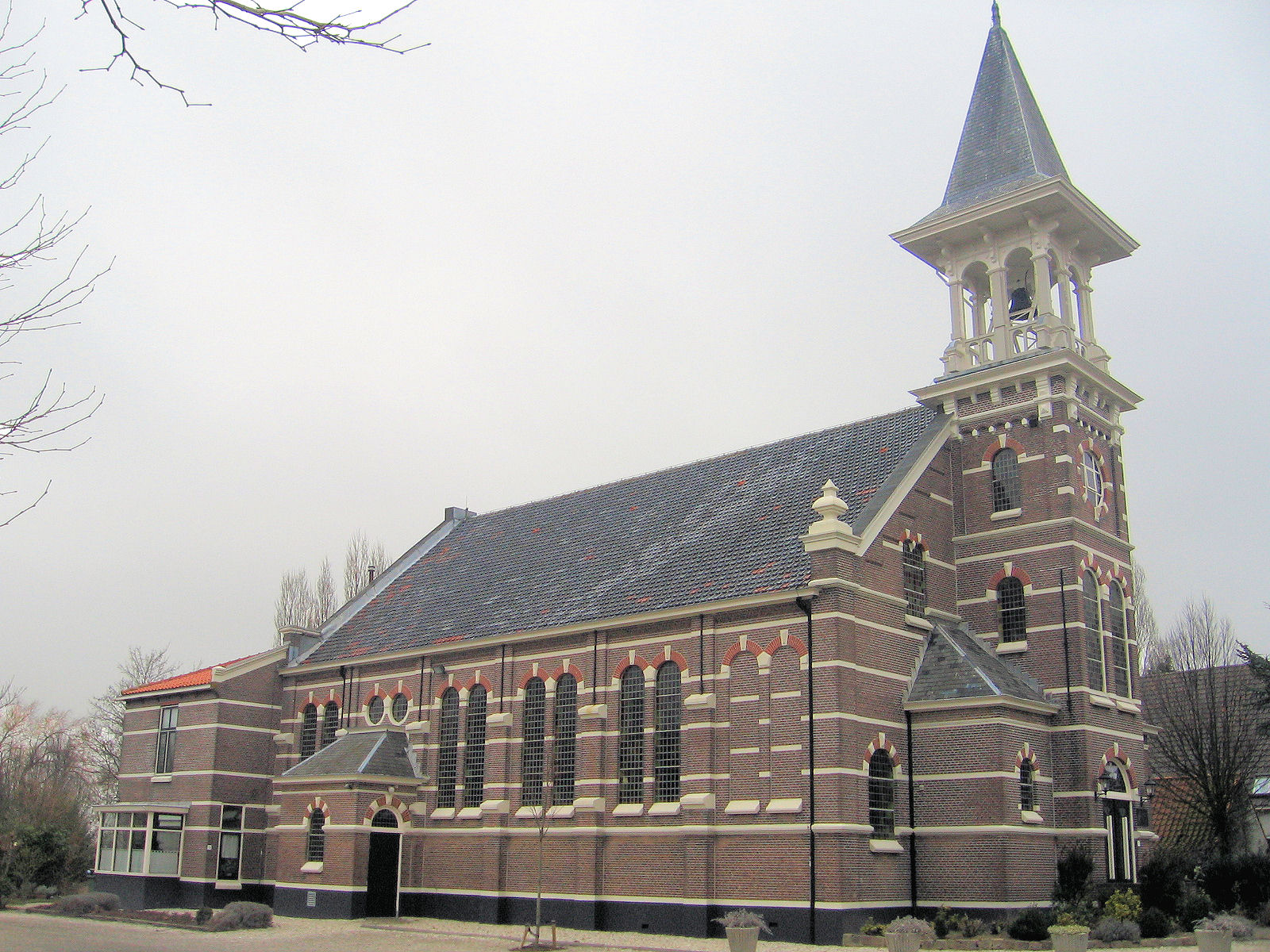 Rijnwoude and surroundings